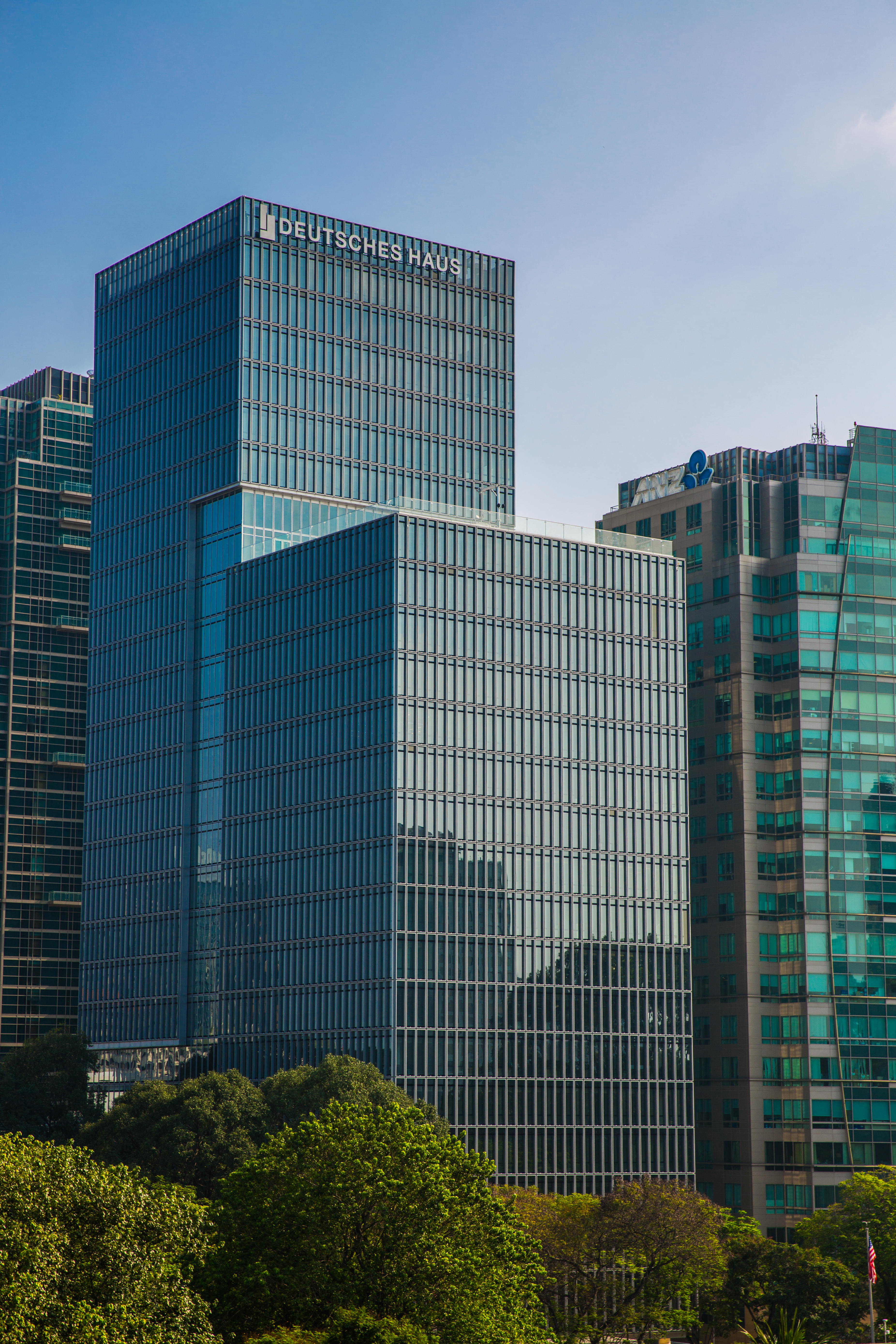 4H4A9394 (1)